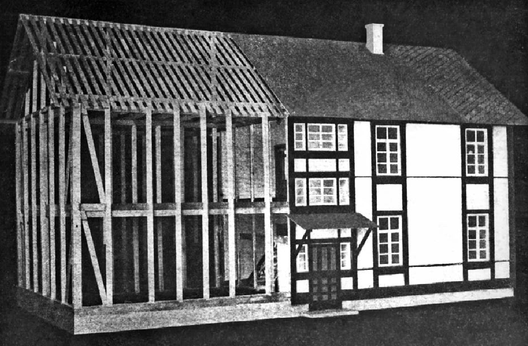 Схема сборного жилого дома Первого Рабочего посёлка